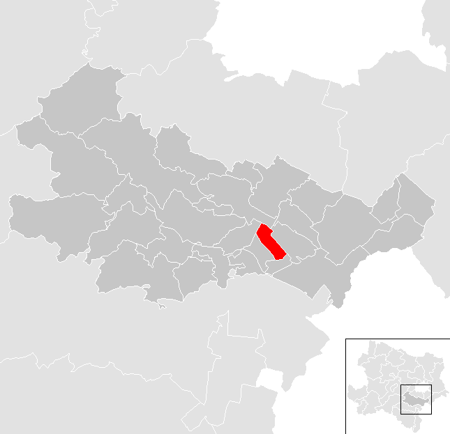 Bezirk Baden